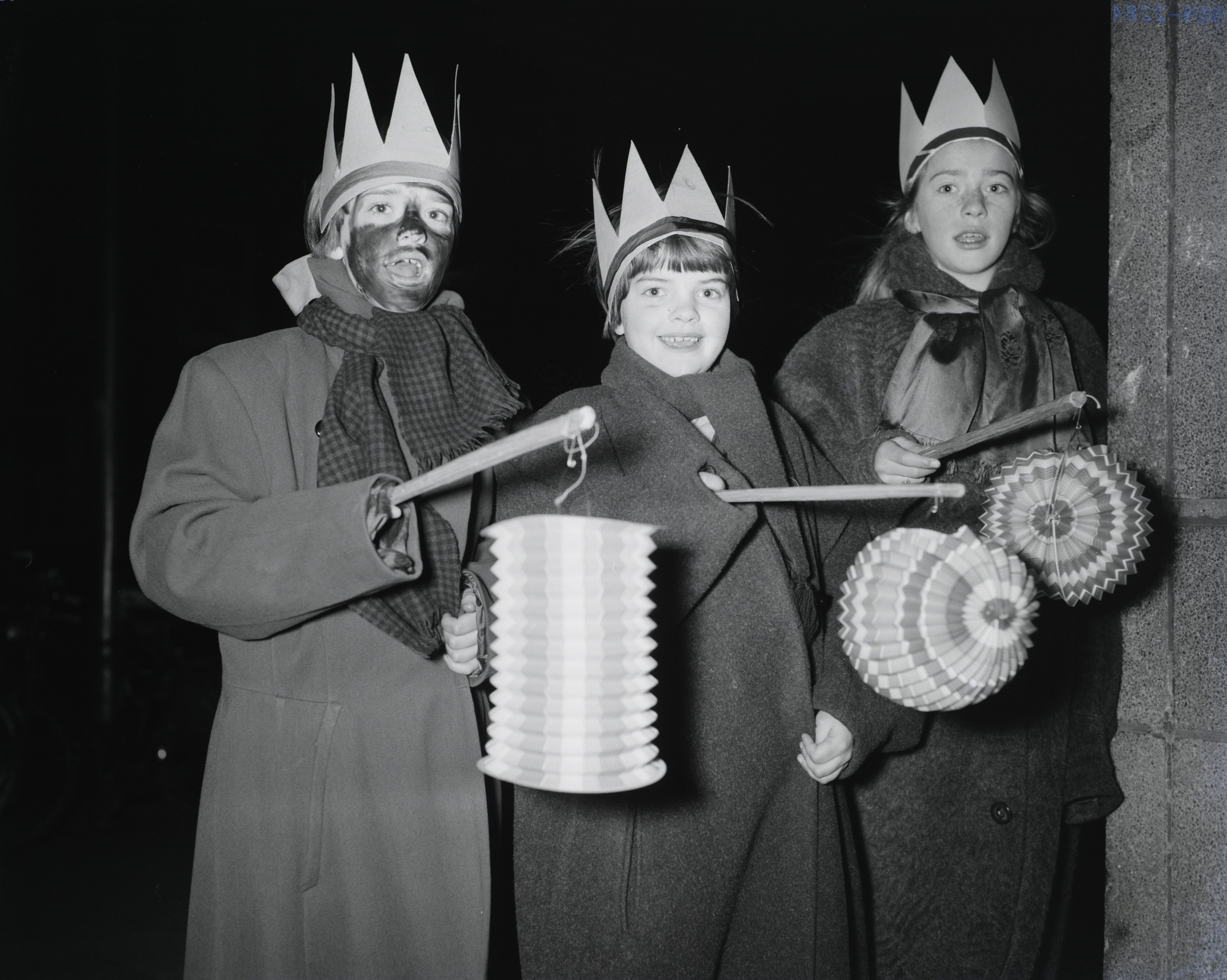 Collectie / Archief : Fotocollectie Anefo Reportage / Serie : [ onbekend ] Beschrijving : Driekoningenfeest te Amsterdam Datum : 6 januari 1958 Locatie : Amsterdam, Noord-Holland Trefwoorden : driekoningen, feesten, kinderen, kronen, lampionnen Persoonsnaam : Driekoningen Fotograaf : Rossem, Wim van / Anefo Auteursrechthebbende : Nationaal Archief Materiaalsoort : Negatief (zwart/wit) Nummer archiefinventaris : bekijk toegang 2.24.01.04 Bestanddeelnummer : 909-2284